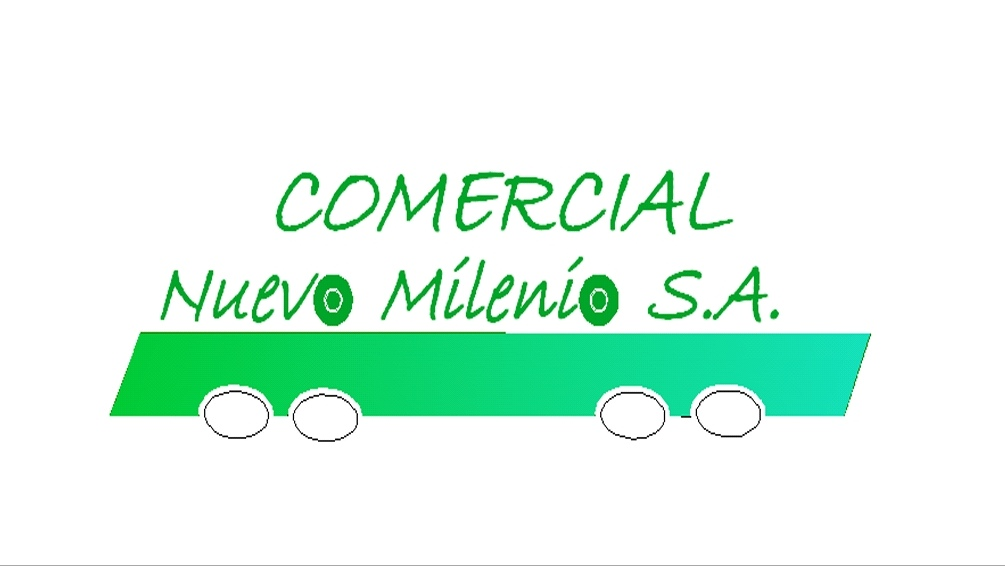 logo comercial nuevo milenio